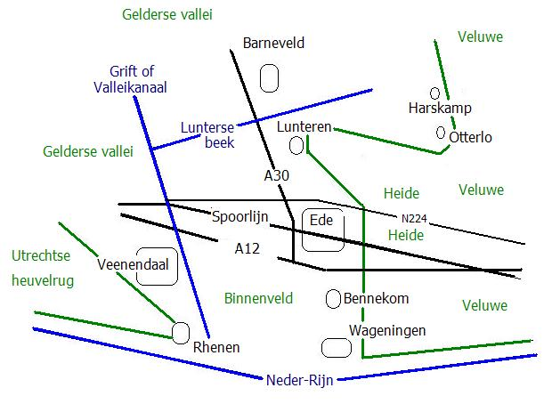 Schetskaartje van Ede en omstreken